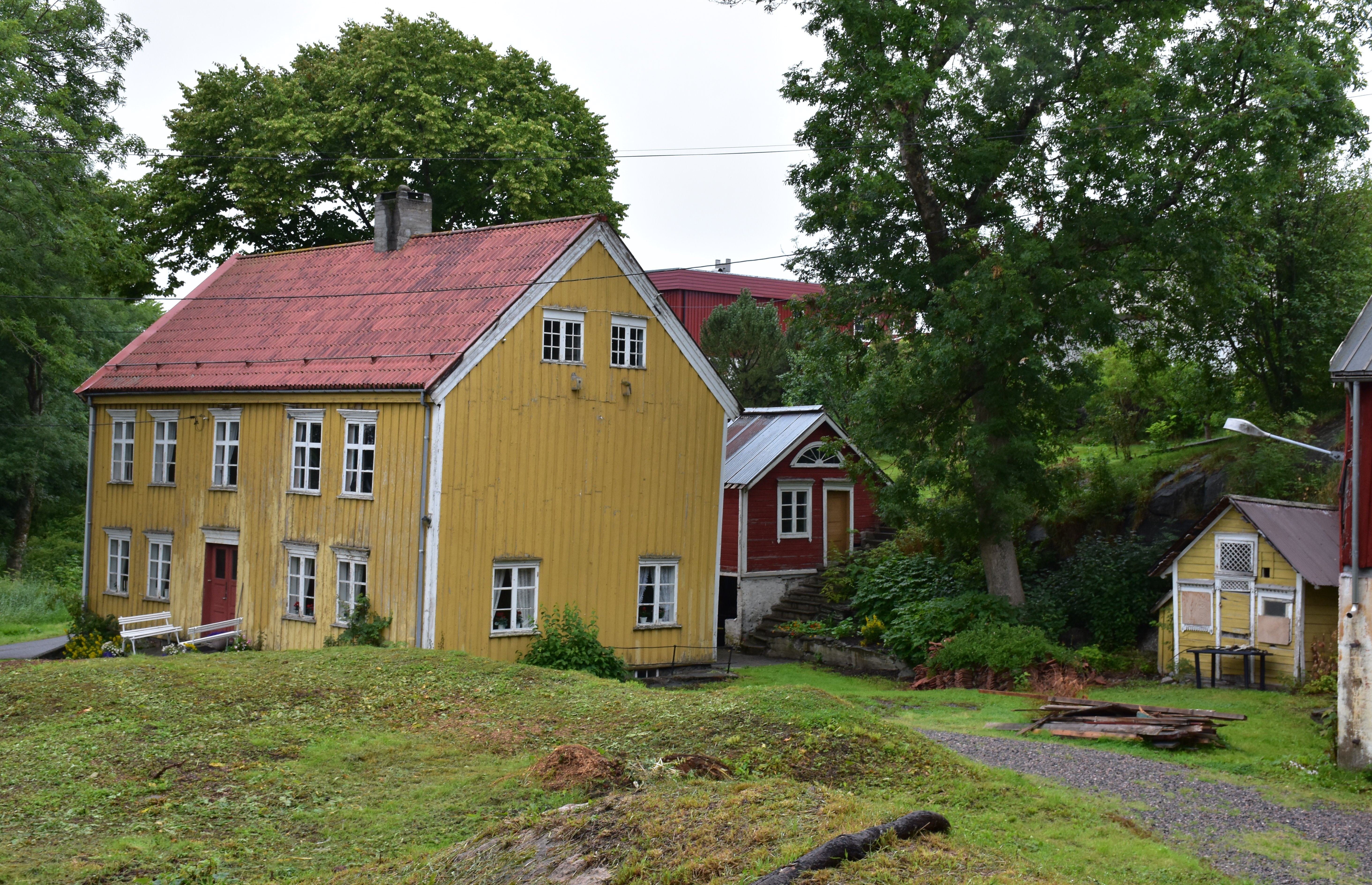 Våningshus ved Dalen gård i Kristiansund